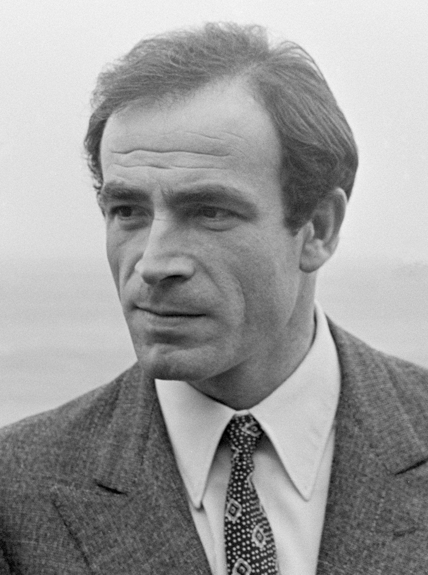 Aankomst Venantino Venantini op Schiphol